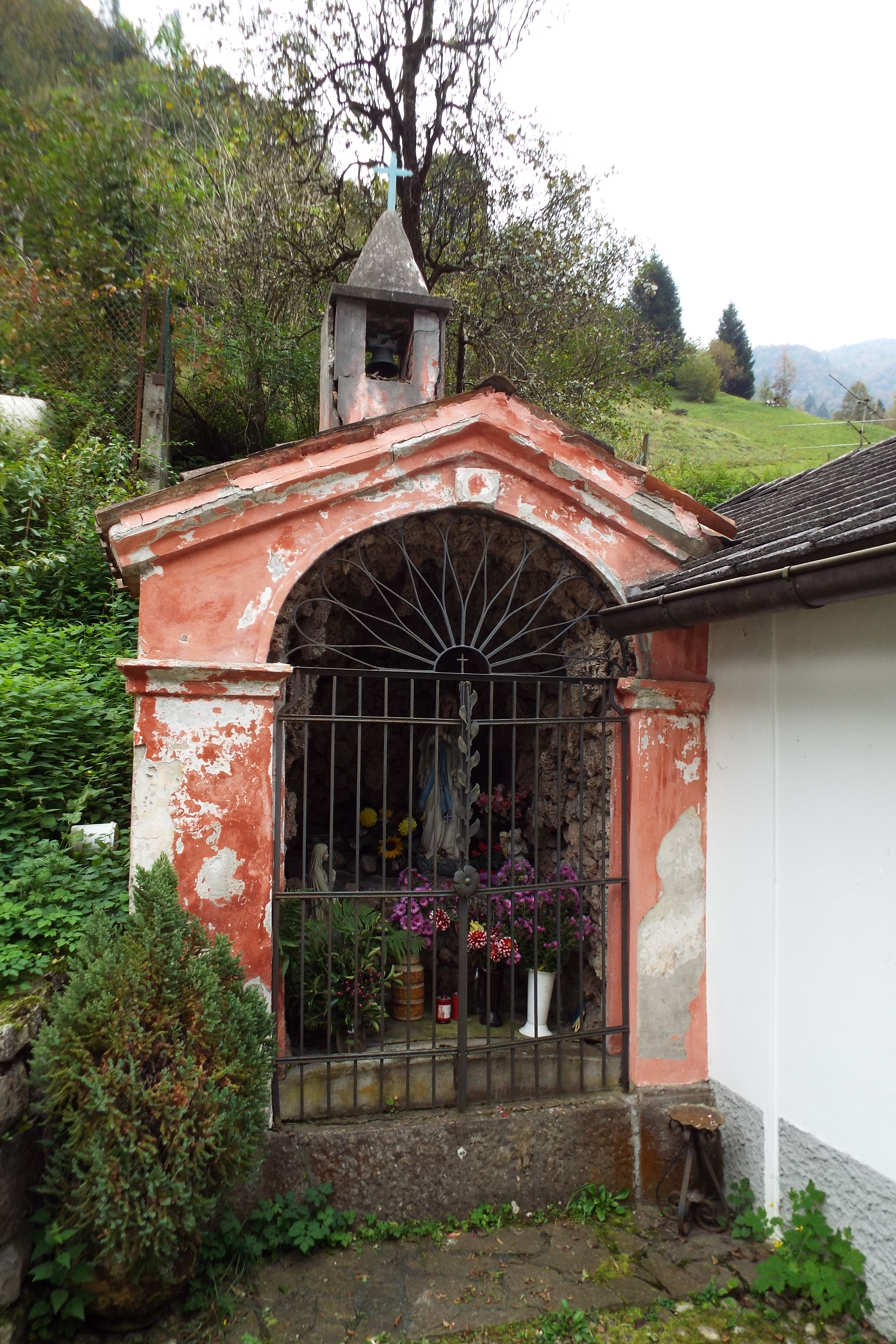 Il capitello nella frazione di Pontet (Imèr) Vèneto: El capitèl de Pontet (Imèr)